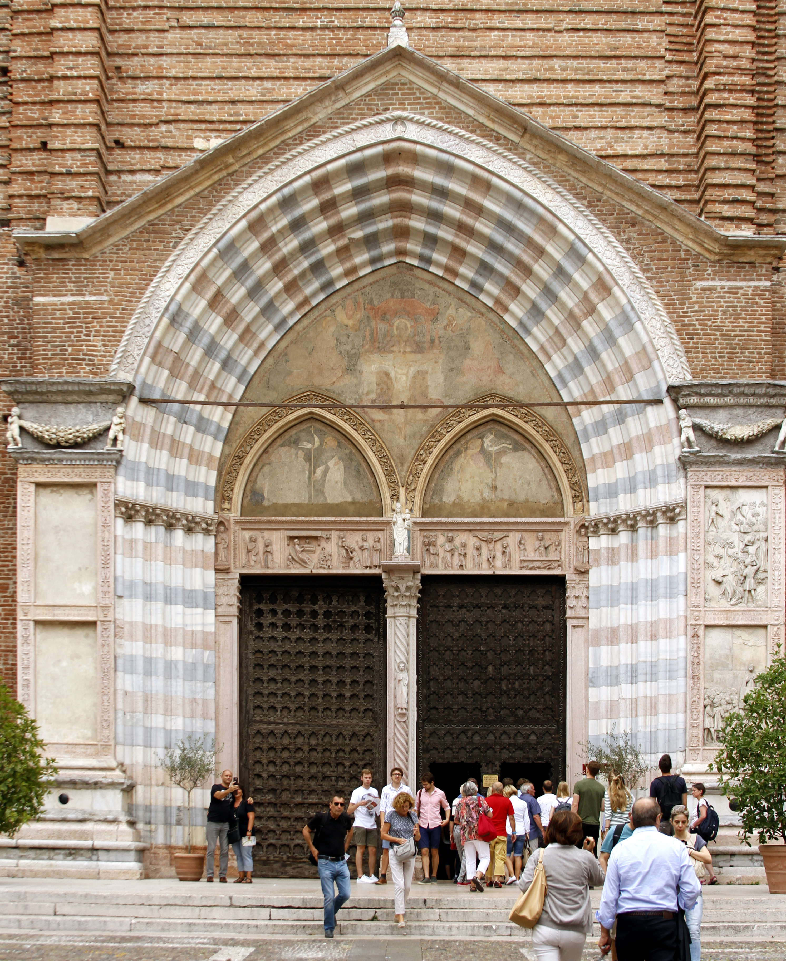 Portale di Santa Anastasia